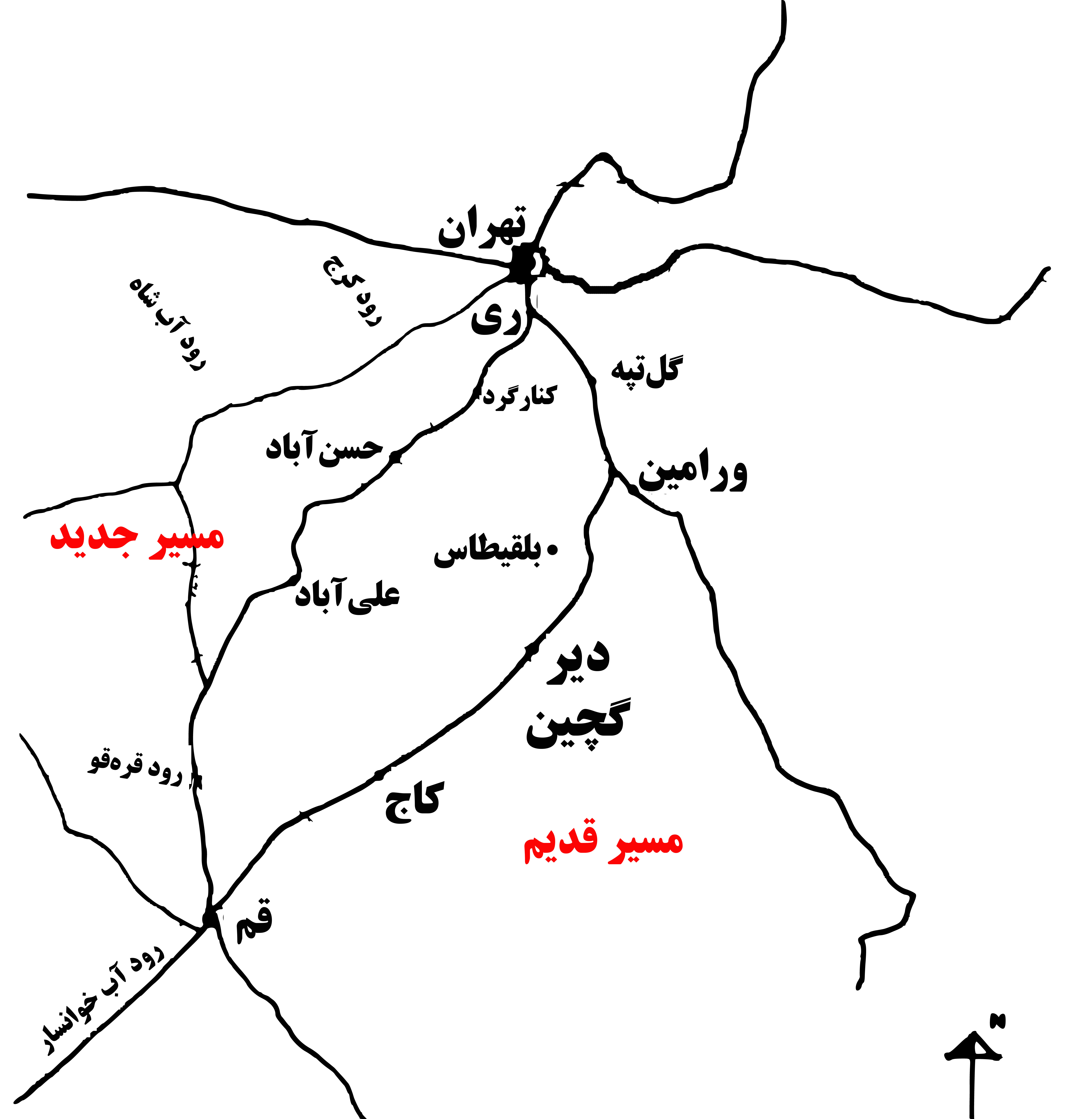 مسیر قدیم بخشی از مسیر باستانی جاده ابریشم است که از ری، ورامین، دیر گچین و کاج به قم می‌رسیده است و مسیر جدید، مسیری است که در زمان قاجار بنا شده و از ری، کنارگرد، حسن‌آباد و علی‌آباد به قم می‌رسد.